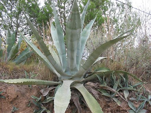 Maguey manso o pulquero (Agave salmiana) Fotografía digital realizada por Pablo Alberto Salguero Quiles o p40p a un ejemplar de 2 m. en Valencia (España)